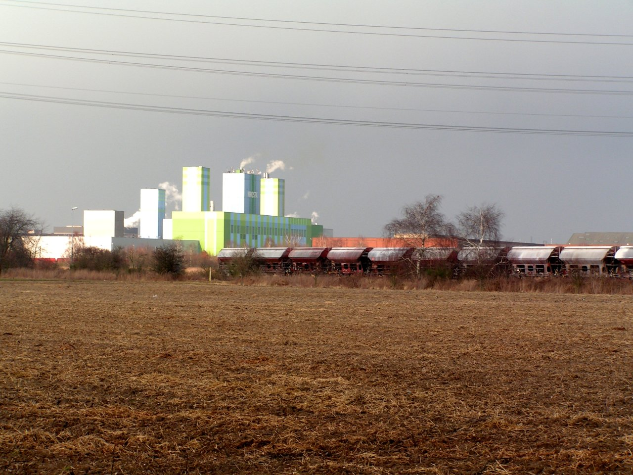 abgestellte Waggons an der Bahnstrecke Krefeld–Rheydt vor dem Krefelder TEW